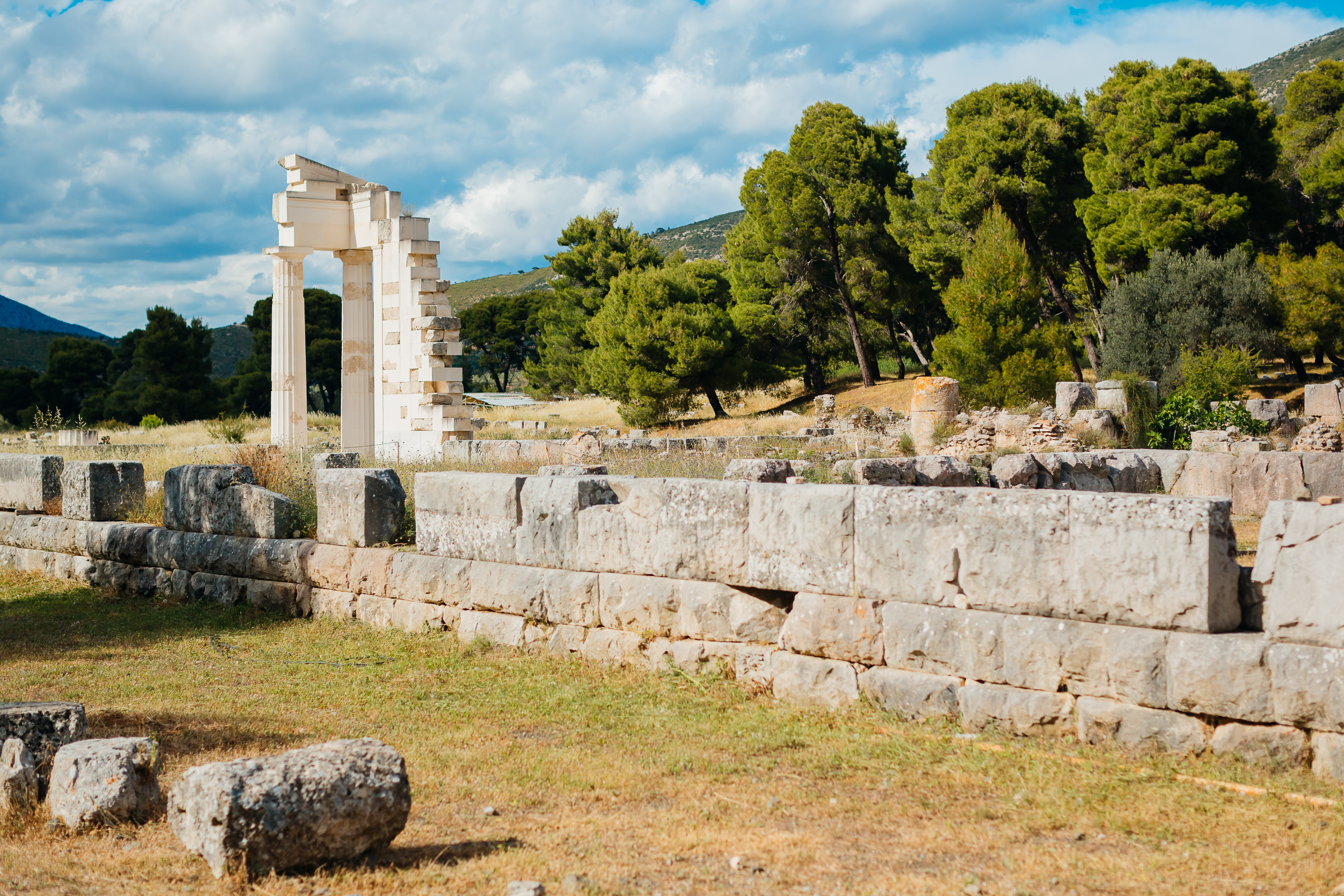 Асклепион, май 2016